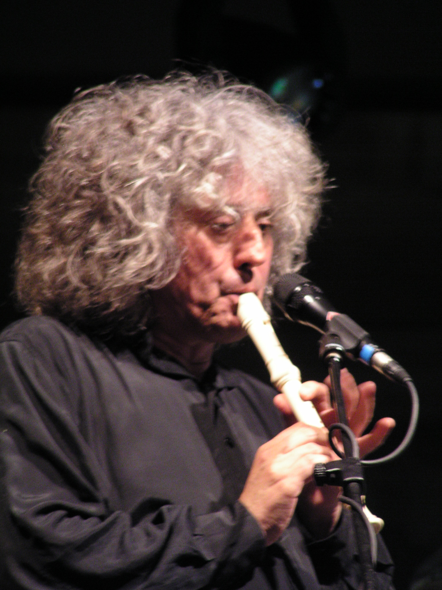 Fotografia di Angelo Branduardi